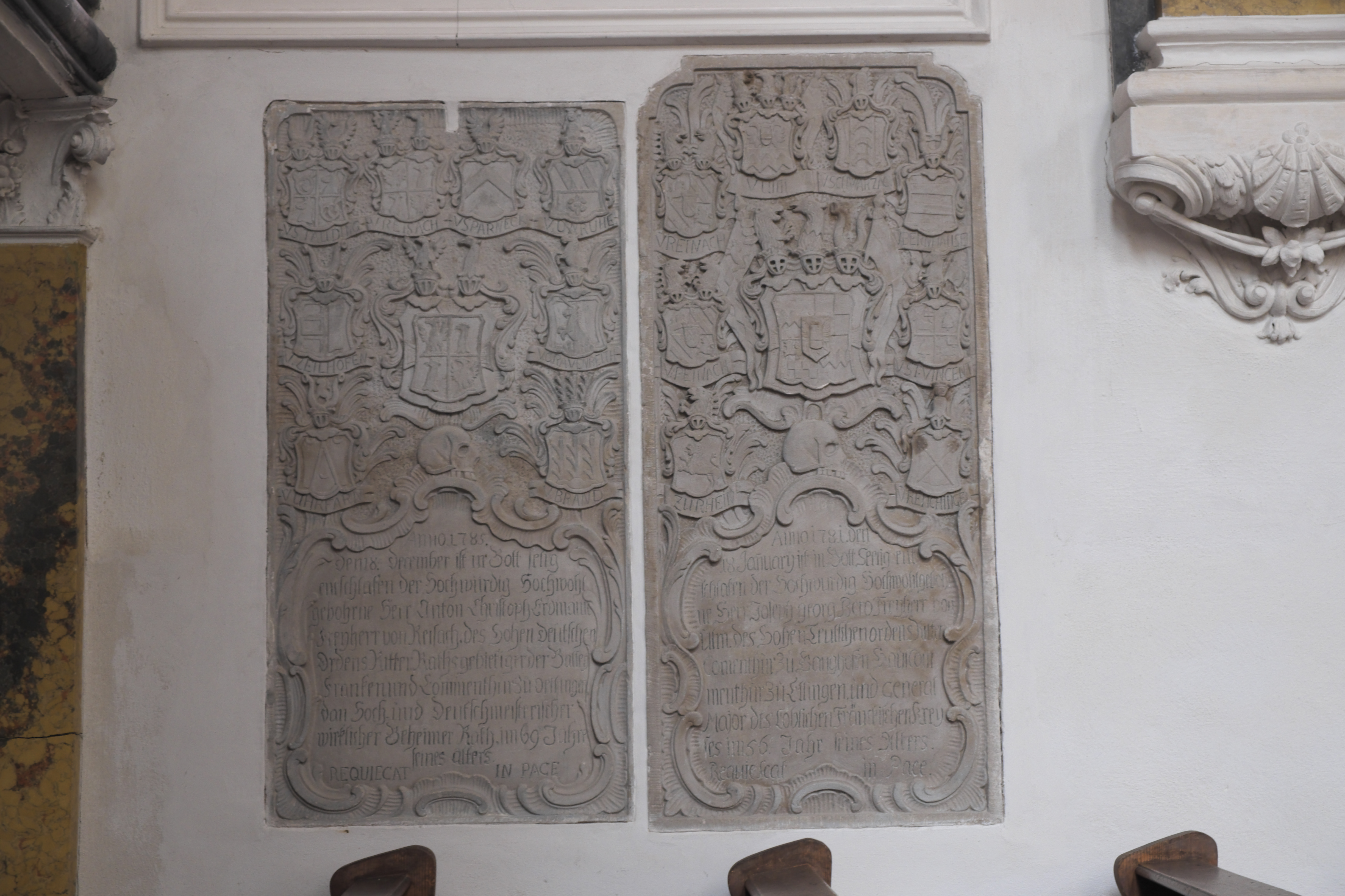 Schlosskirche des ehemaligen Deutschordensschlosses in Ellingen im Landkreis Weißenburg-Gunzenhausen (Mittelfranken/Bayern), Epitaphien der Deutschordensritter Anton Christoph Erdmann von Reischach und Johann Georg Bero von Ulm, mit Familien- und Ahnenwappen